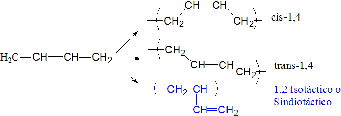 Reacción del 1,3 butadieno para resaltar tacticidad en las reacciones de polimerización